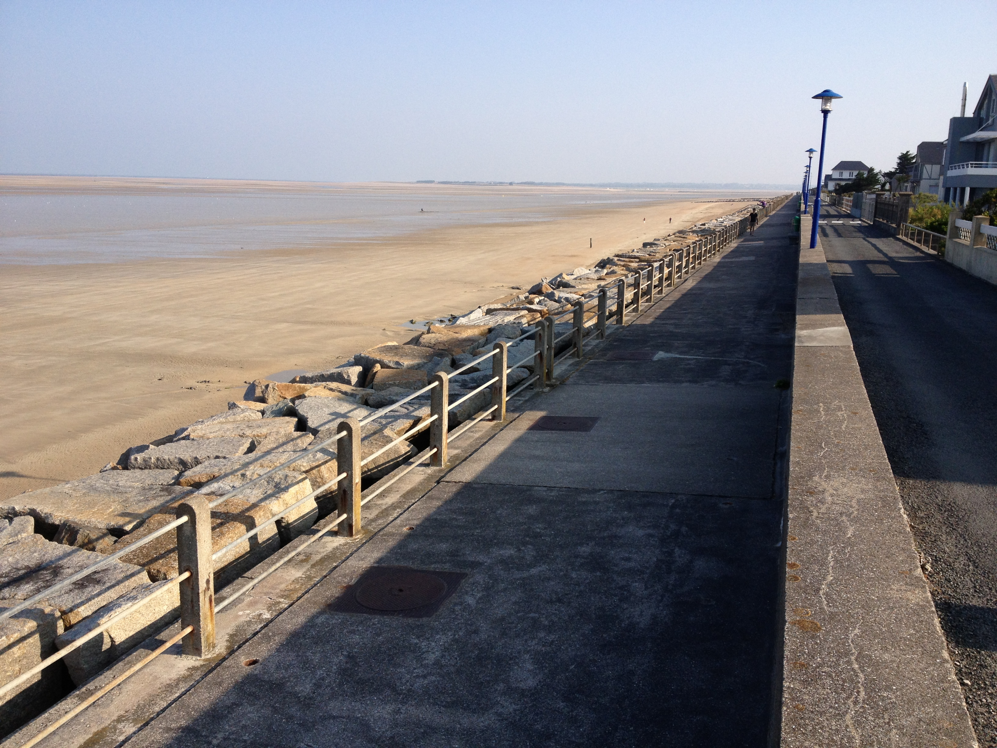 la digue de Hautveville sur Mer Plage (France, Manche)